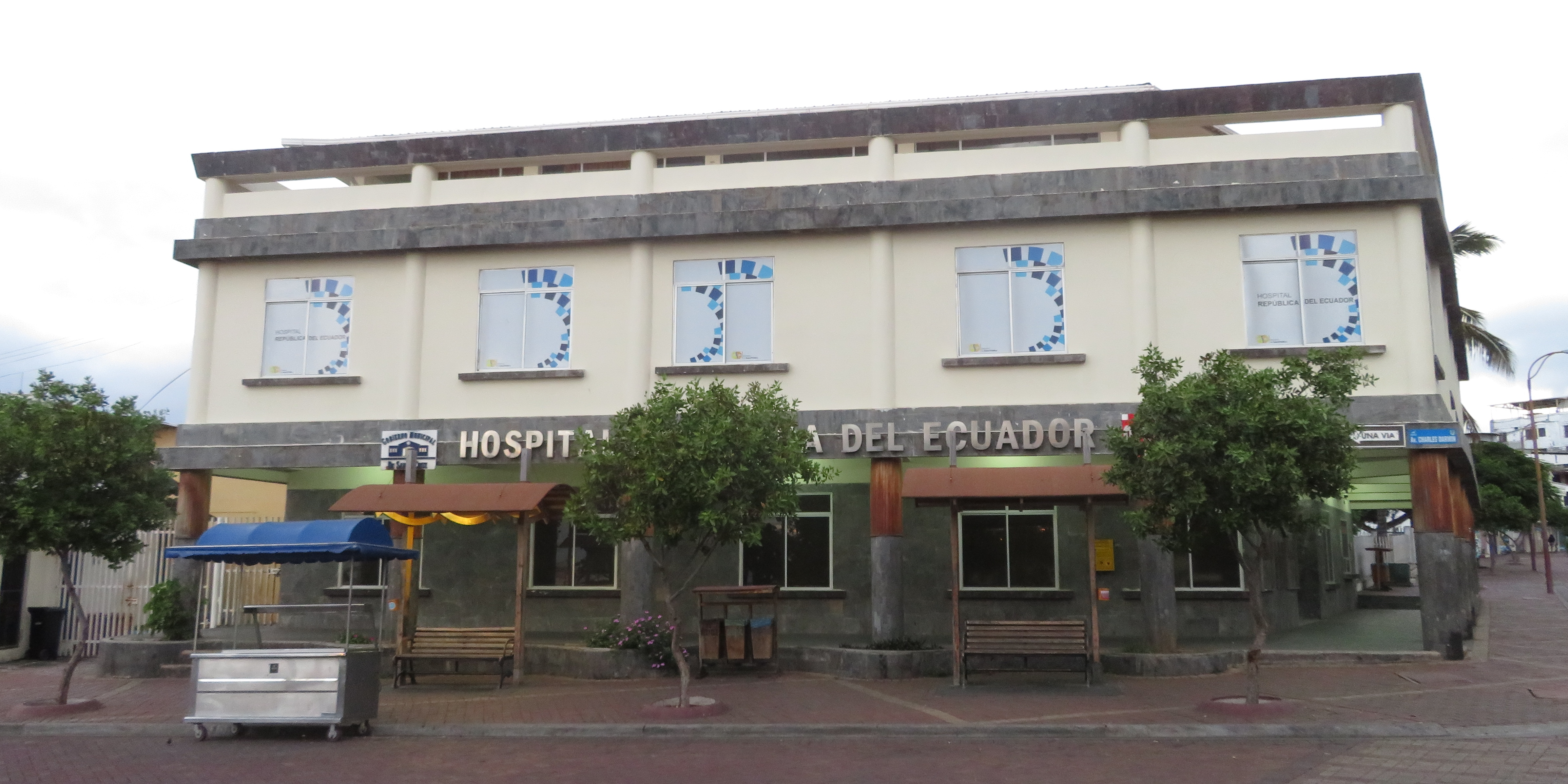 Hospital, Puerto Ayora, Isla Santa Cruz, Islas Galápagos, Ecuador